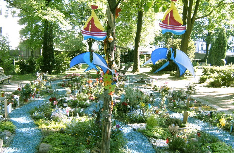 Eine Gemeinschaftsgrabstelle für verstorbene Babys auf dem Alten St.-Matthäus-Kirchhof Berlin seit 2007